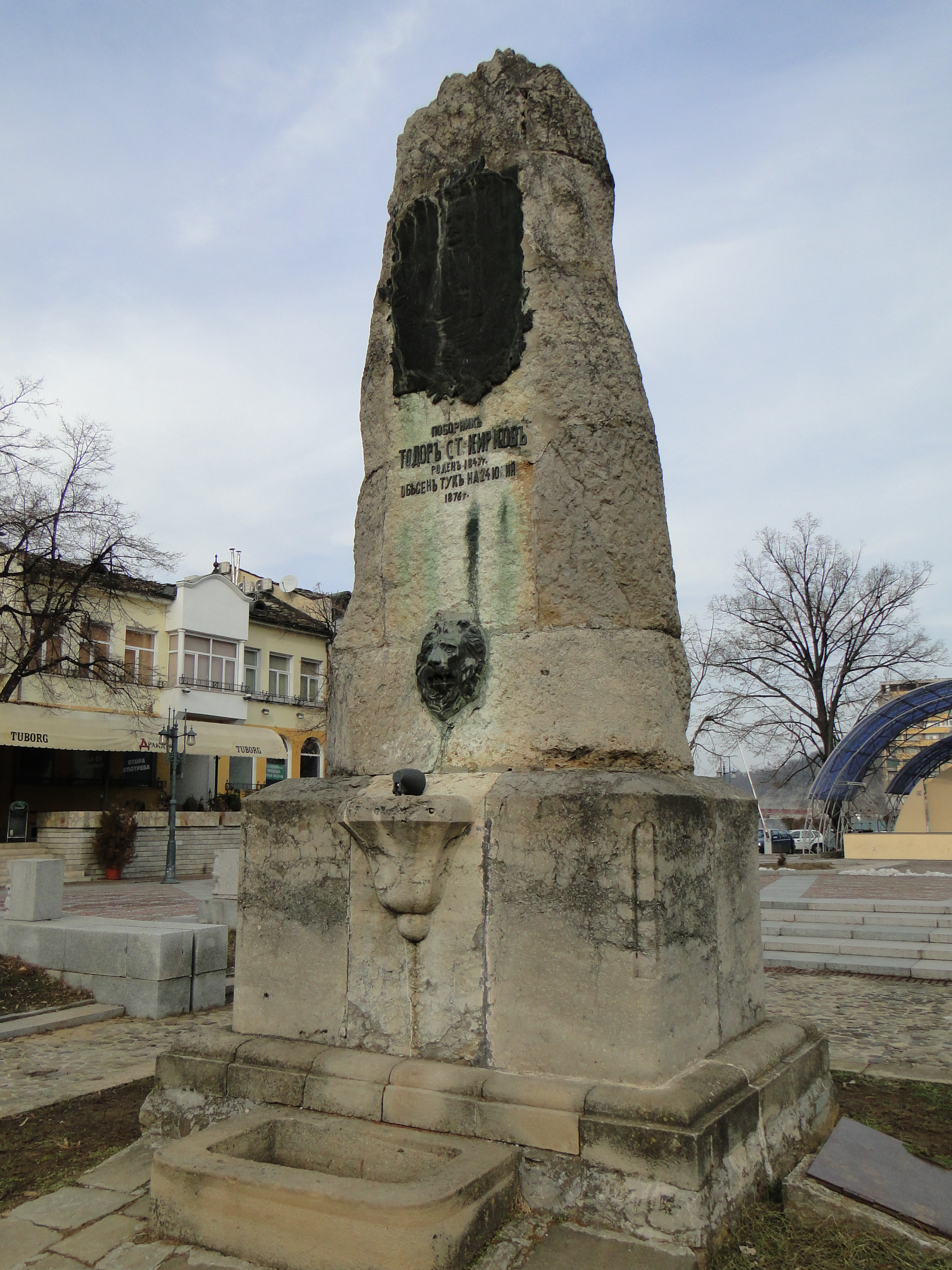 Ловеч